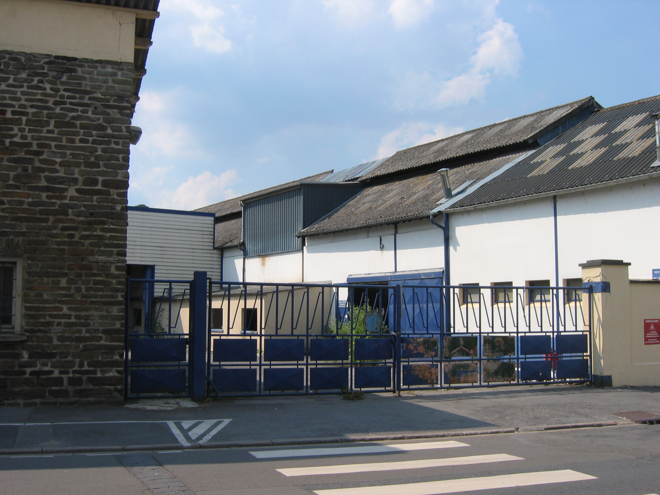 Entrée principale des ex-Ateliers Thomé-Génot puis Ardennes Forge à Nouzonville Ardennes France